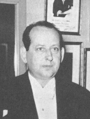 Eduard Tubin, 1947